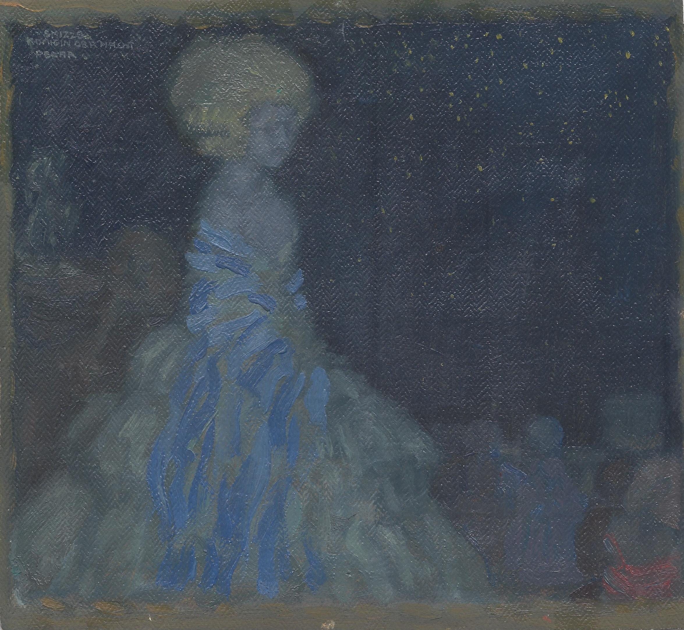 Hanns Pellar: Ölskizze, betitelt Königin der Nacht. Provenienz: Moderne Galerie Heinrich Thannhauser, Nr. 715, 1910, Privatsammlung München.